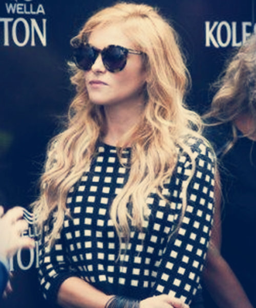 Paulina Rubio Desprevenida En La Fabrica De Koleston Julio 2014